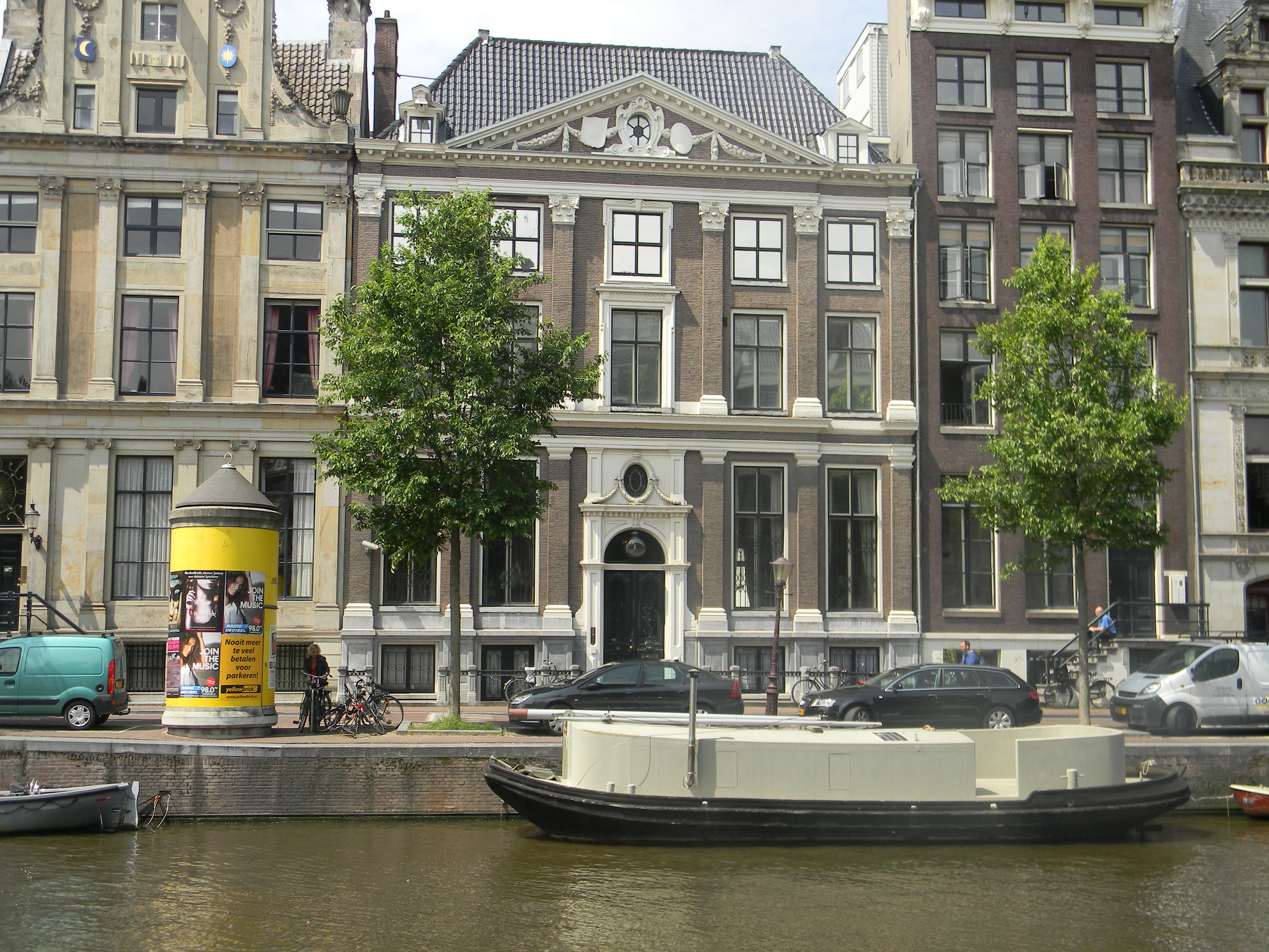 Rijksmonument 1828. Herengracht 386 in Herengracht. Dubbel huis met pilastergevel voorzien van een fronton op de middenrisaliet, in 1663 gebouwd door Philips Vingboons; ingangspartij en stoeppalen XIXc. Vanaf 1 april 2011 is hierin museum Het Grachtenhuis gevestigd.